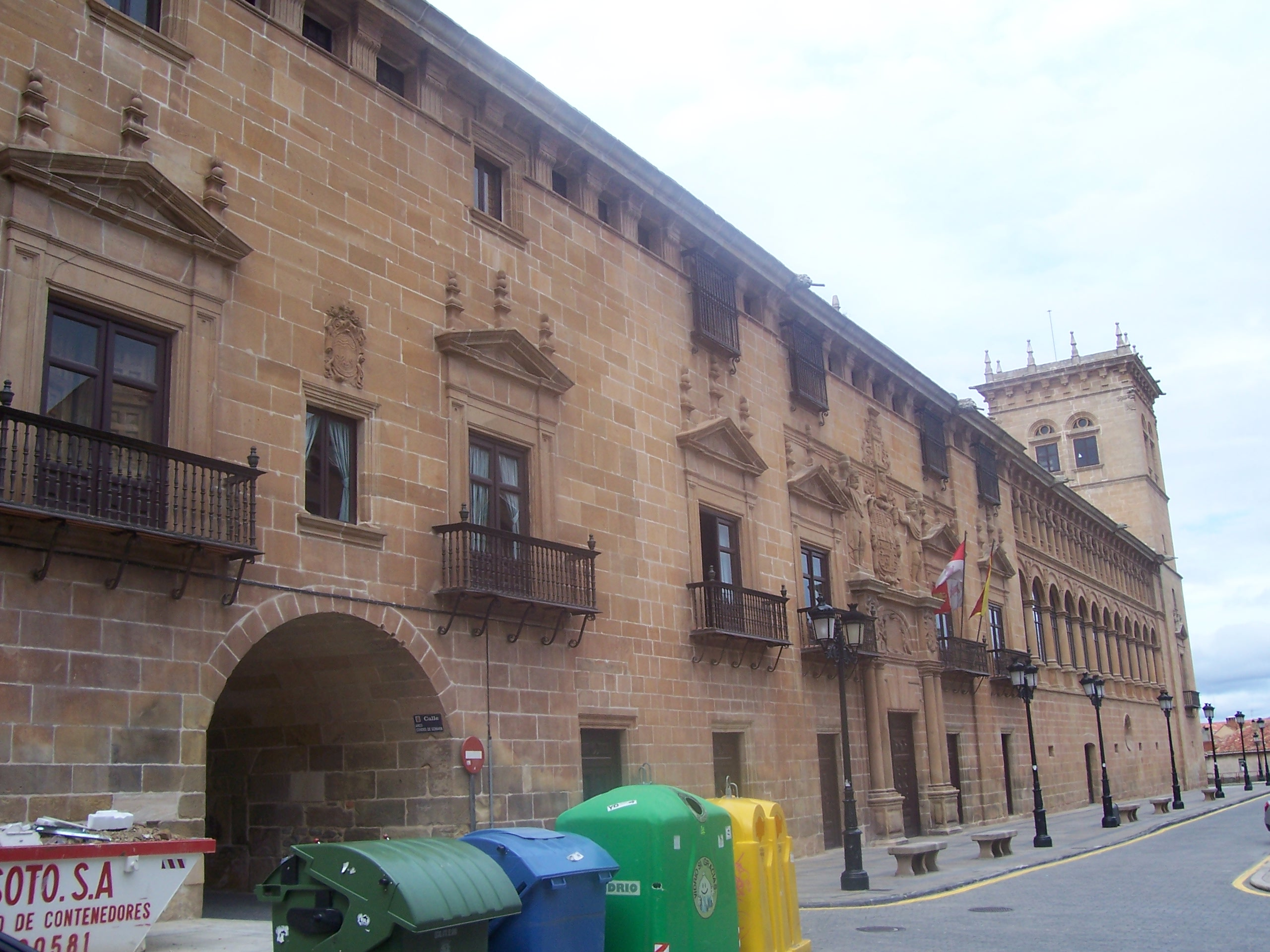 Palacio de los Condes de Gomara